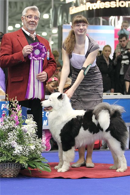 Арктур Северная Звезда - Чемпион России, Евразии, РКФ, Победитель НКП-Якутская Лайка.